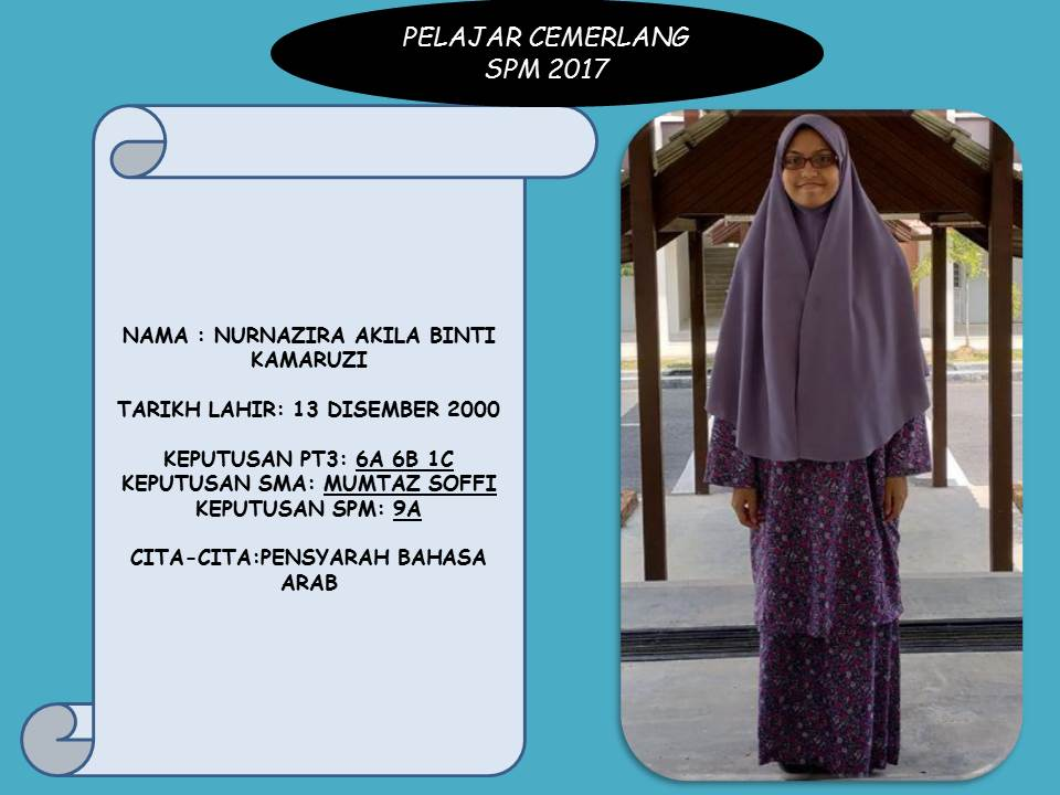 SMA JAIM ASSYAKIRIN